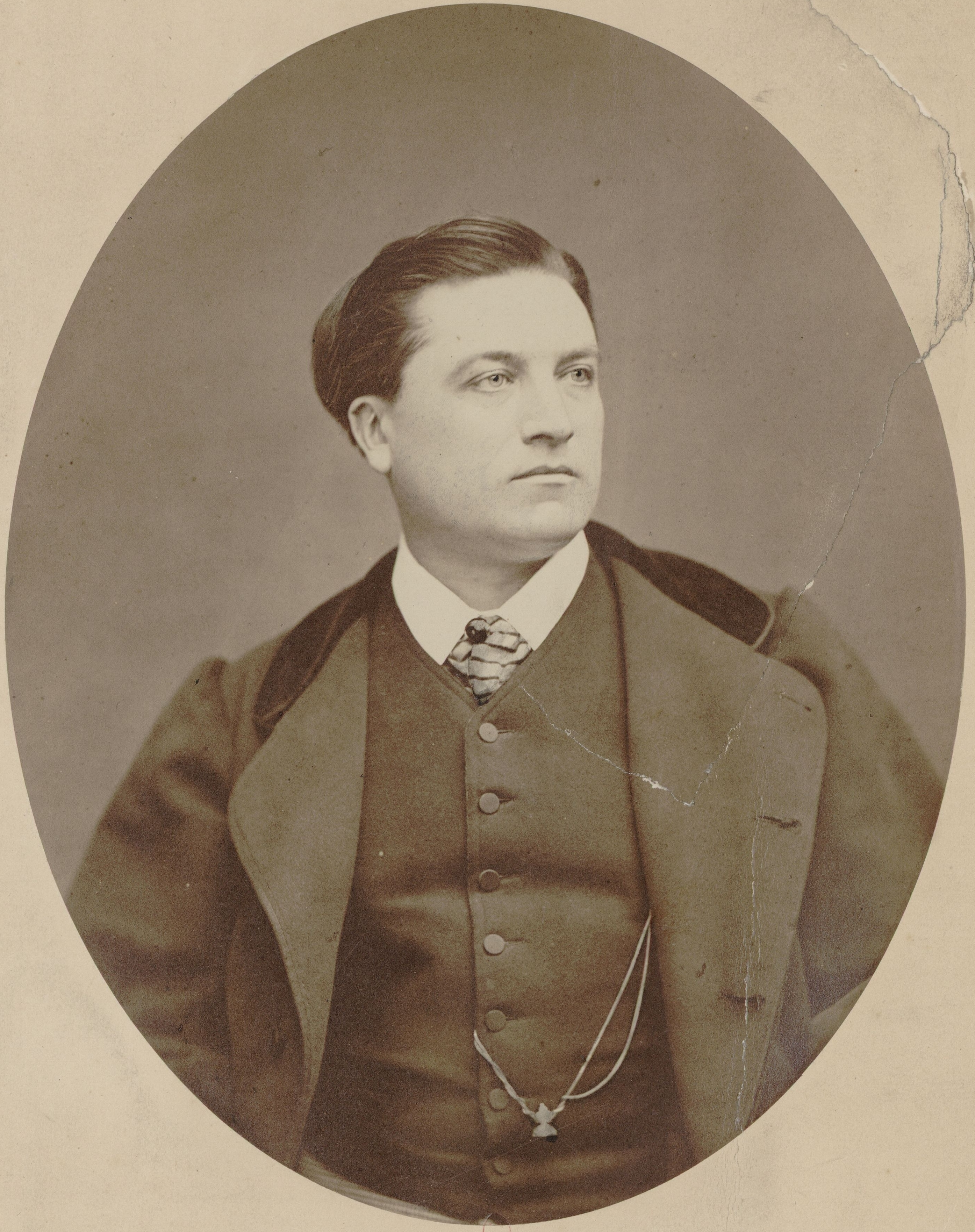 Léon Achard.